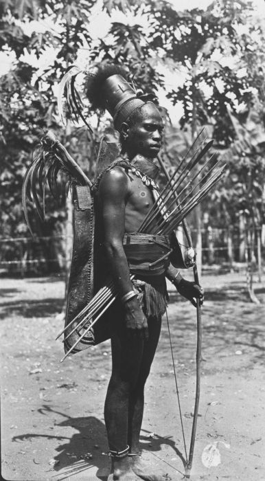 Foto. Bewoner uit Ende op Flores staat klaar voor de jacht of de strijd